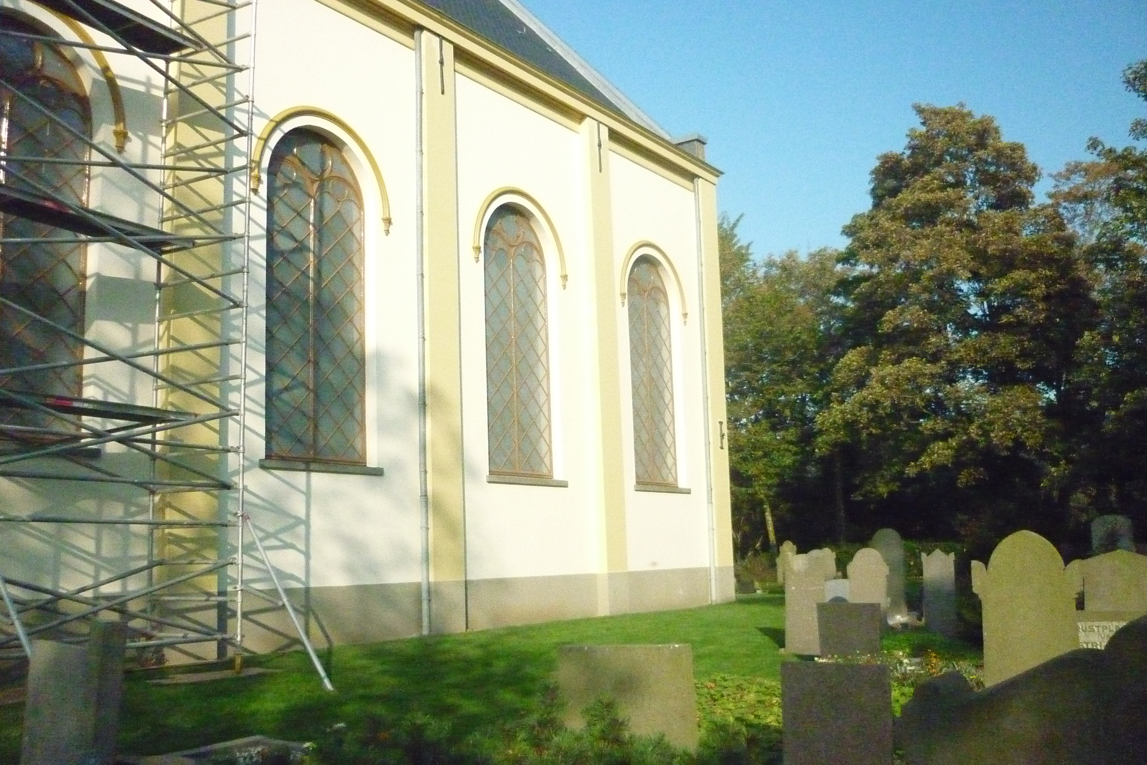 Lucaskerk in Winkel, zonder steunberen